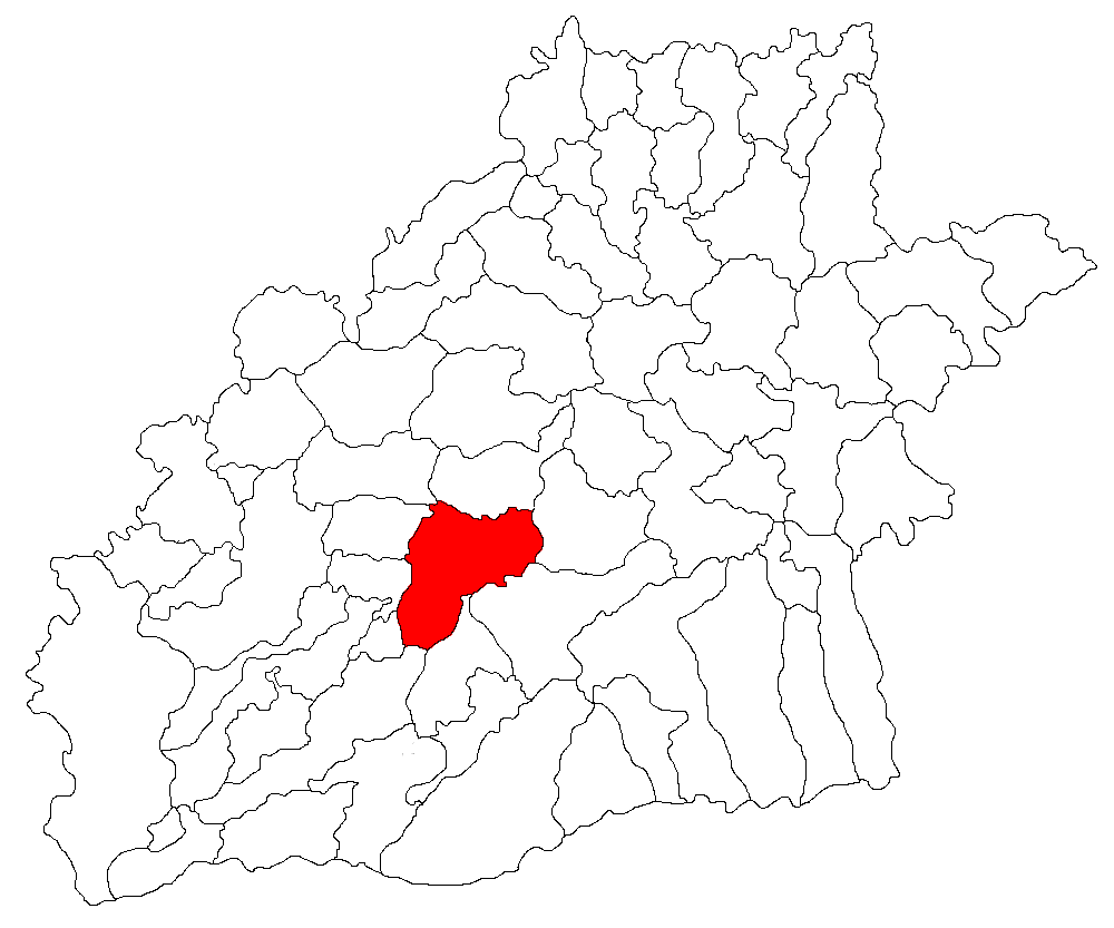 Categorie:Hărţi ale judeţului Sibiu Licensing Categorie:Imagini din Sibiu